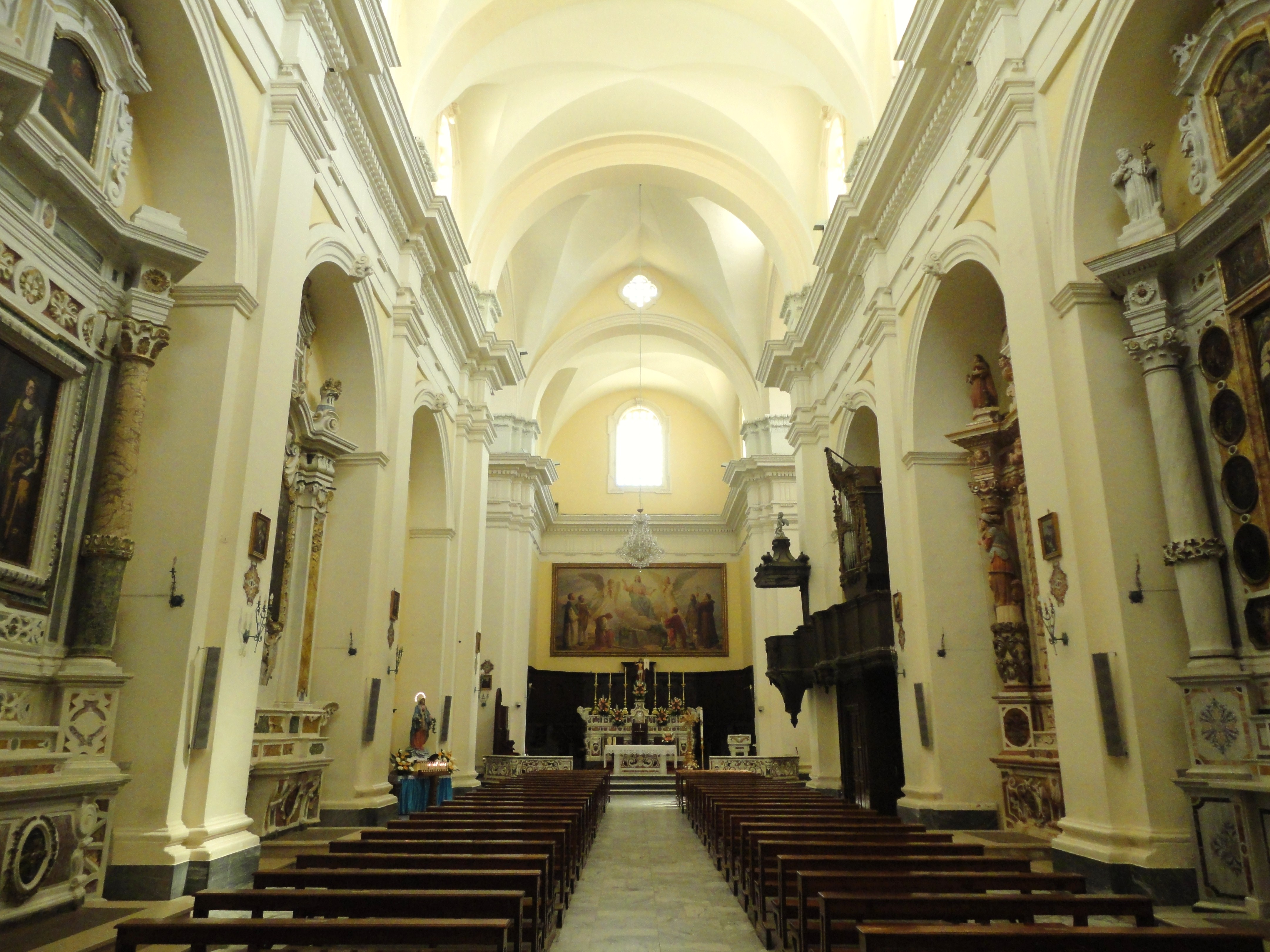 Interno Cattedrale di Ugento, Lecce